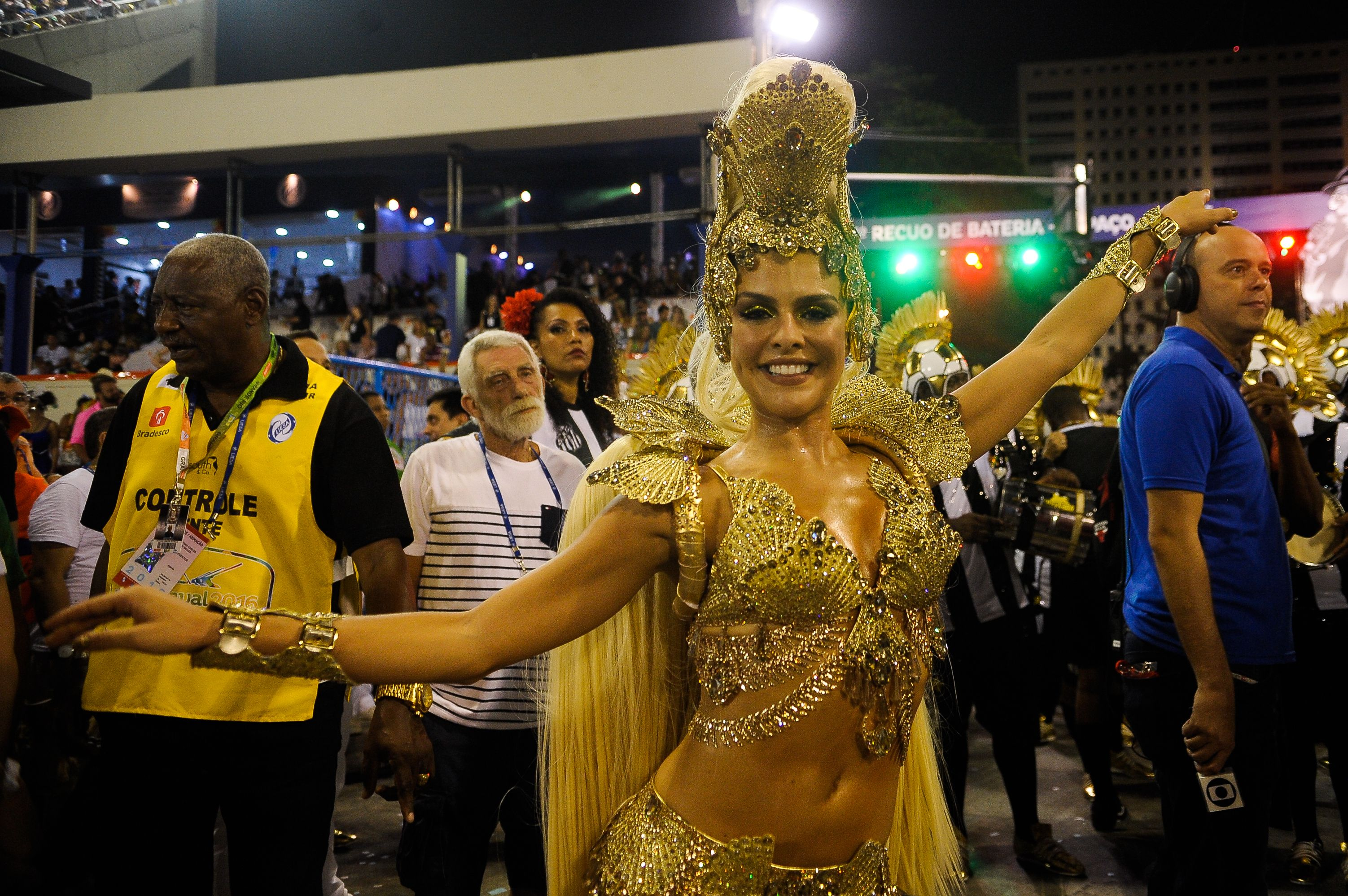 Rio de Janeiro - Acadêmicos do Grande Rio, a quarta escola do grupo especial do Carnaval do Rio,homenageia o Santos, com famosas e citações a Pelé e Neymar (Tomaz Silva/Agência Brasil)